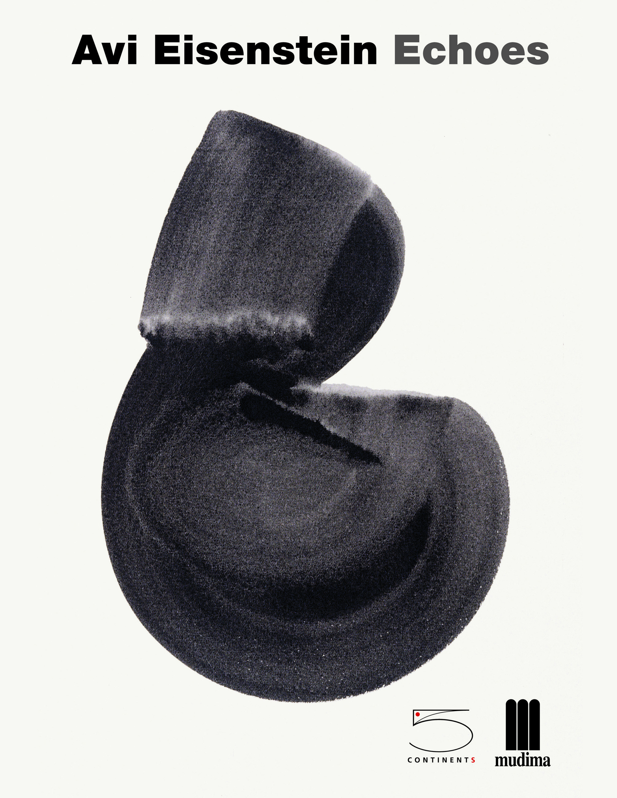 אבי איזנשטיין-Echoes ציורים ורישומים מוזאון מודימה -מילנו 2005